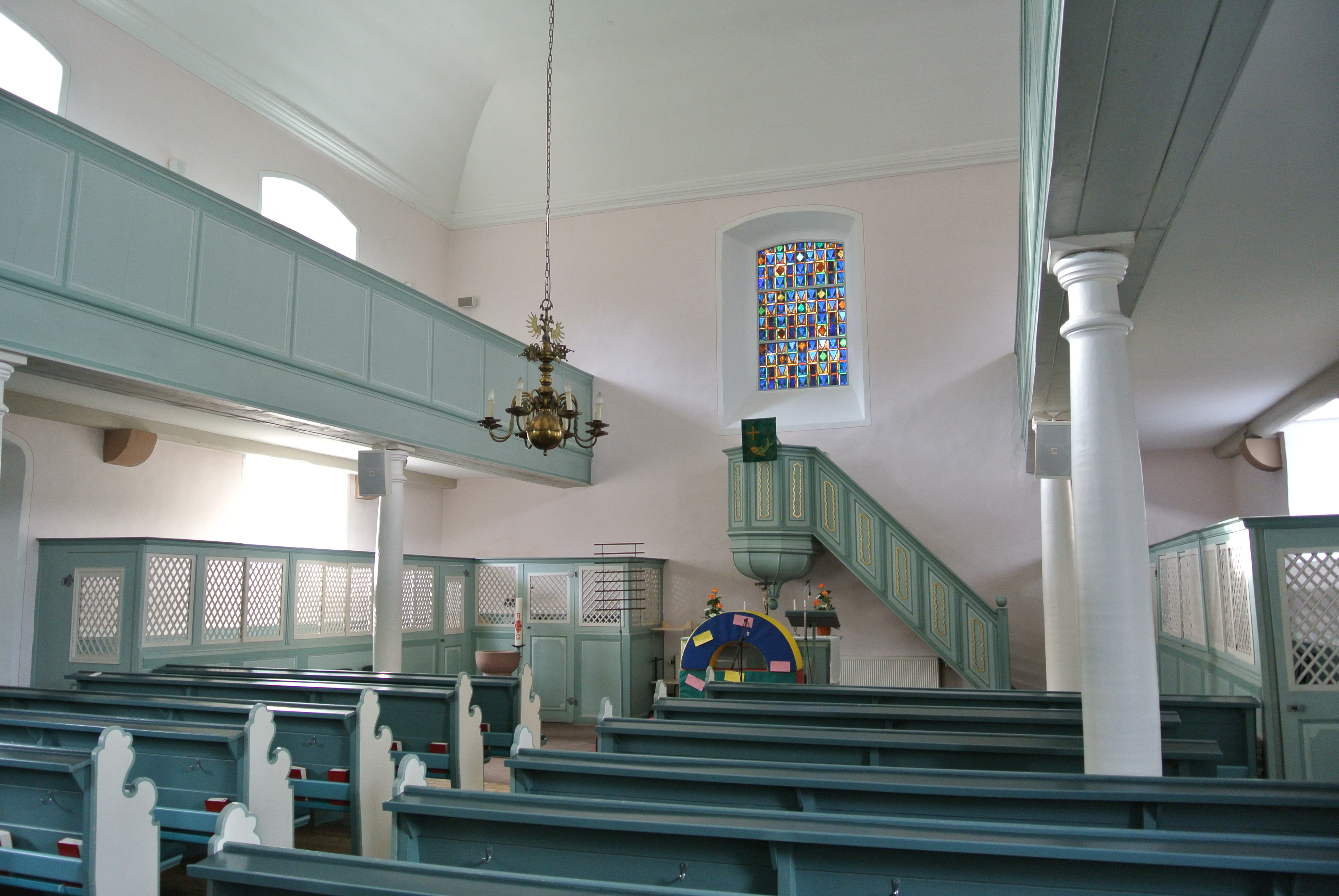 Barocke Saalkirche in Frankfurt-Berkersheim von 1766, Baumeister: Berger Vikar Christ, Baudenkmal, Innenraum